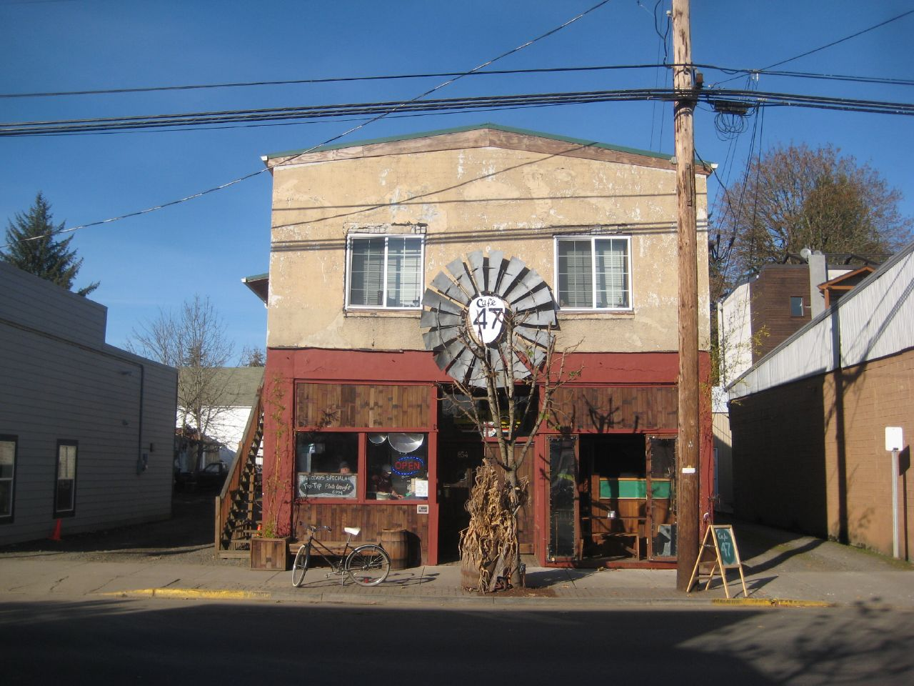 vernonia, oregon